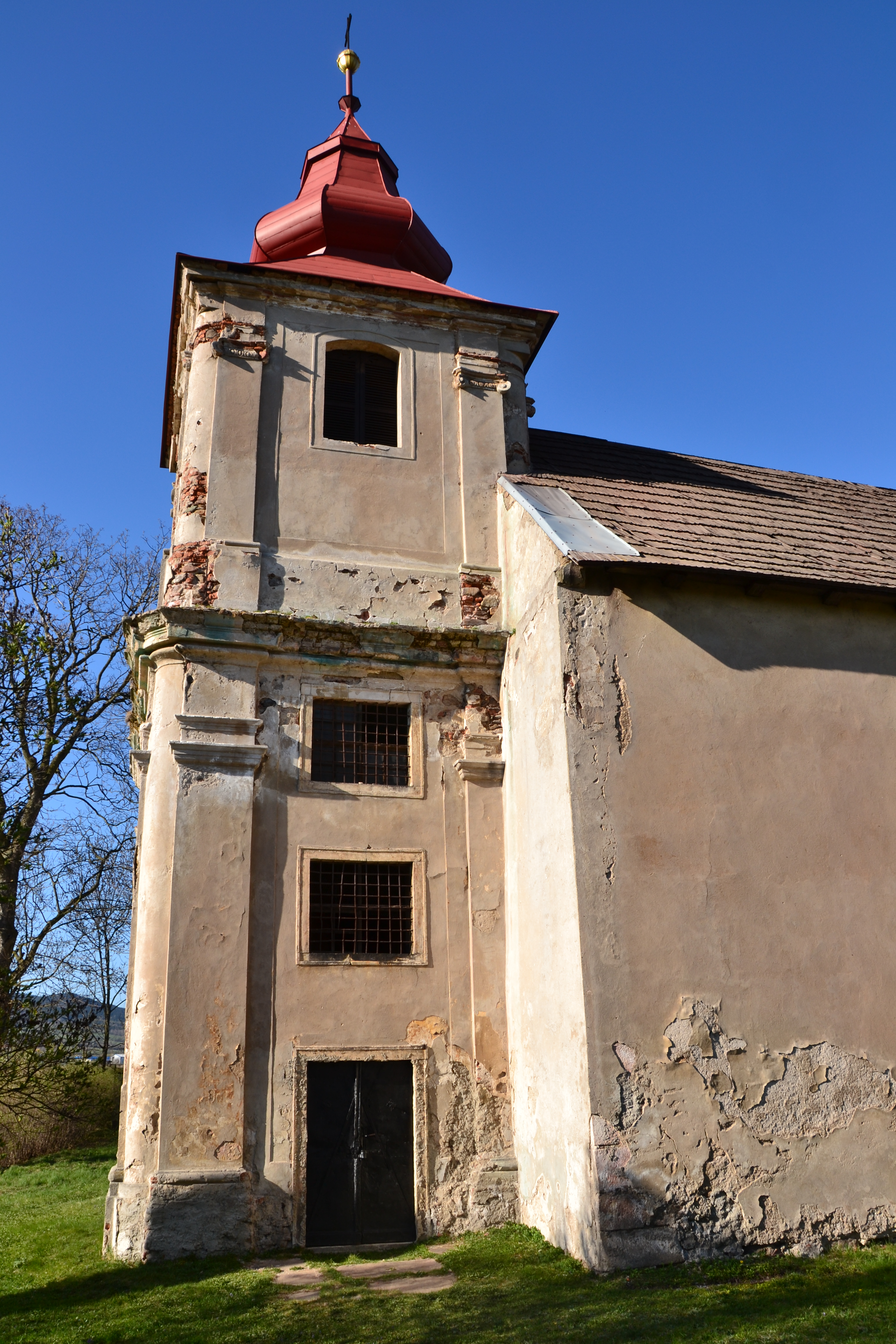 Zazděný jižní portál, Kostel svatého Mikuláše, Mikulovice (Klášterec nad Ohří).